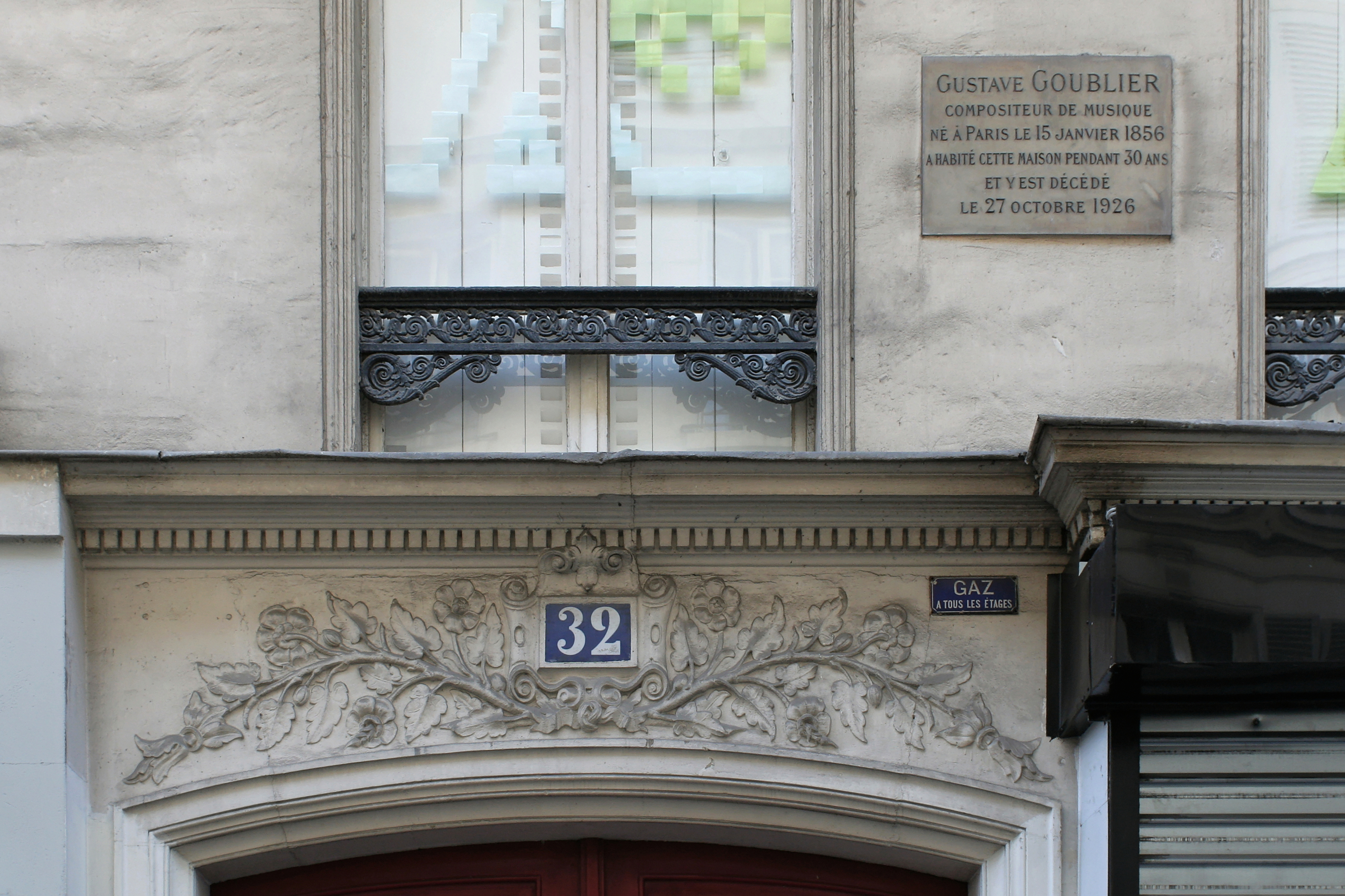 32 rue de l'Échiquier (Paris), où habita Gustave Goublier, compositeur.